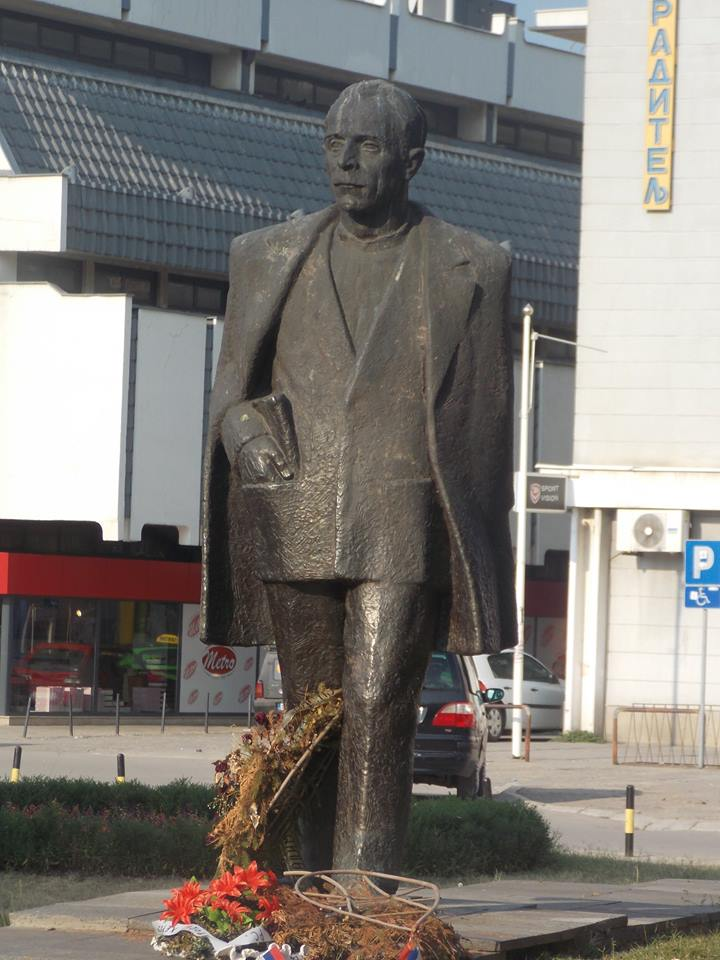 Тоҷикӣ: Биста Косте Стаменковић